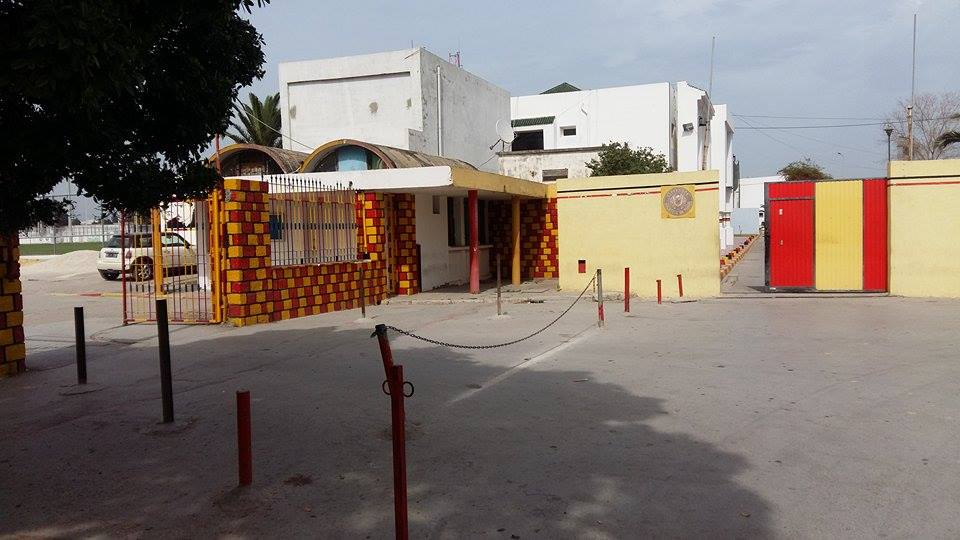 Parc Hassen Belkhodja,avenue Mohamed V,Tunis, Tunisie